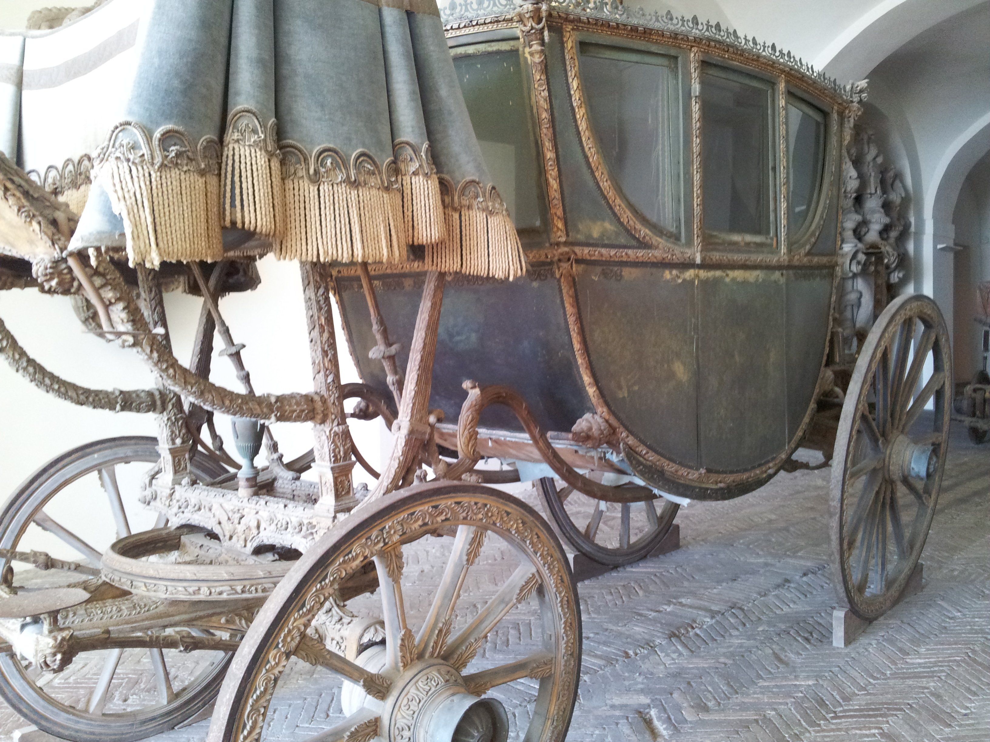 Museo di San Martino (Napoli) - Una carrozza reale